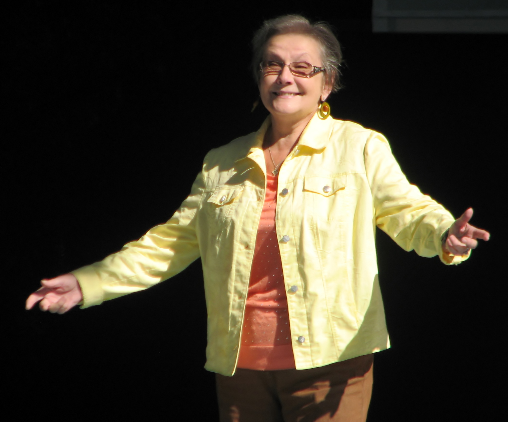 Helgi Sallo Estonia 109. hooaja avamisel